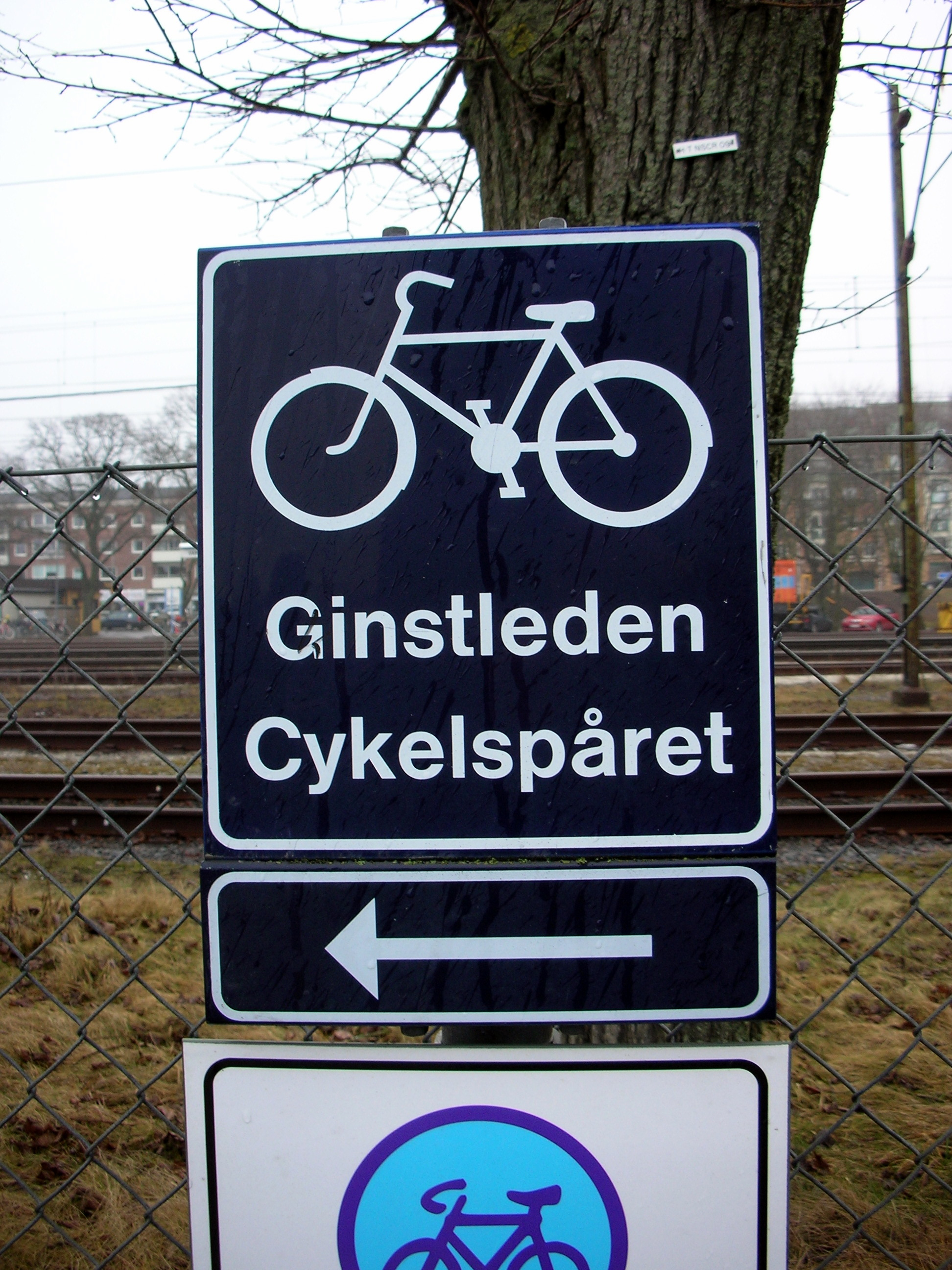 Ginstleden.